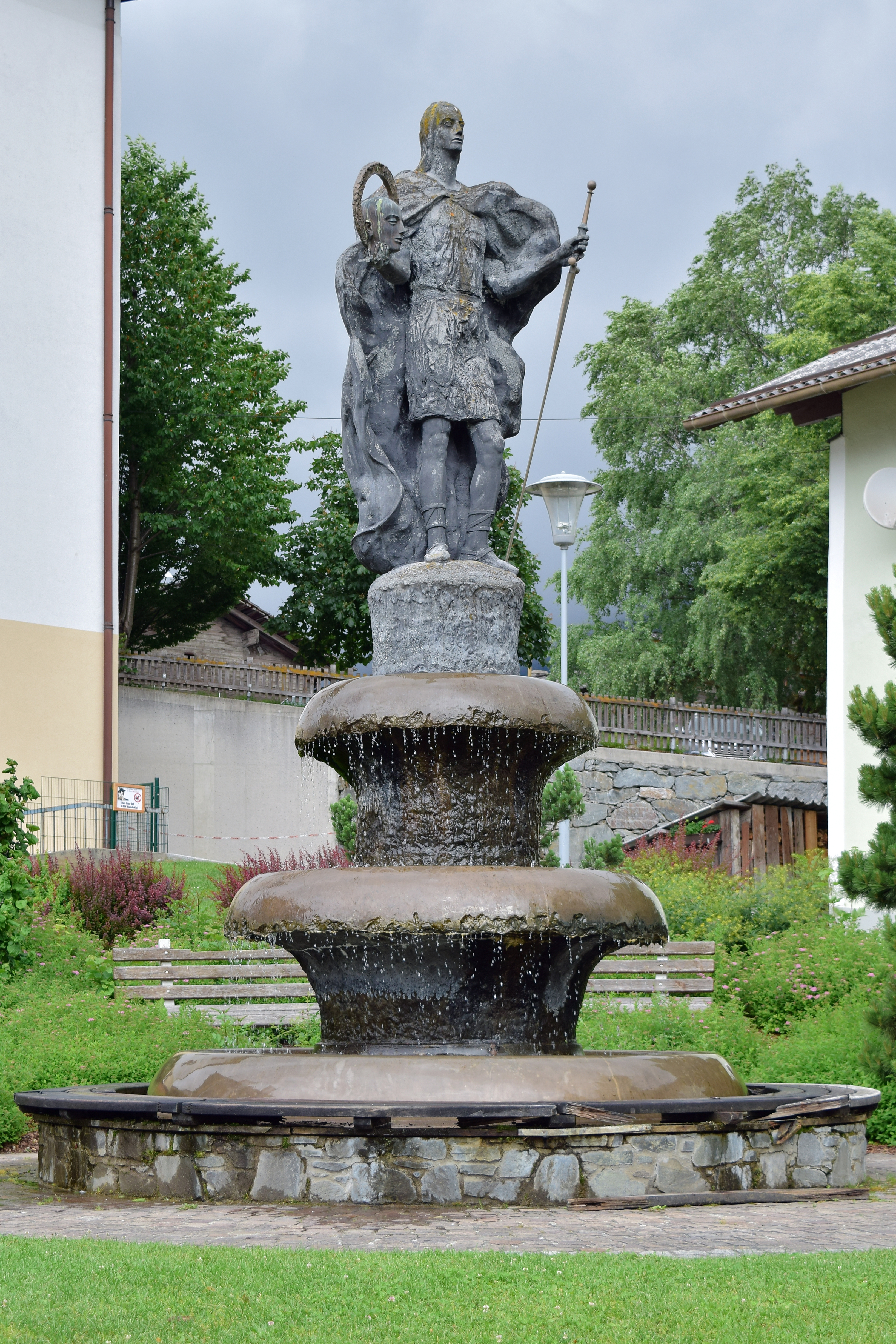 Der Brunnen mit der Figur des hl. Alban von Mainz wurde 1998 von Fritz Tiefenthaler geschaffen. This media shows the remarkable cultural object in the Austrian state of Tyrol listed by the Tyrolean Art Cadastre with the ID 104168. (on tirisMaps, pdf, more images on Commons, Wikidata)